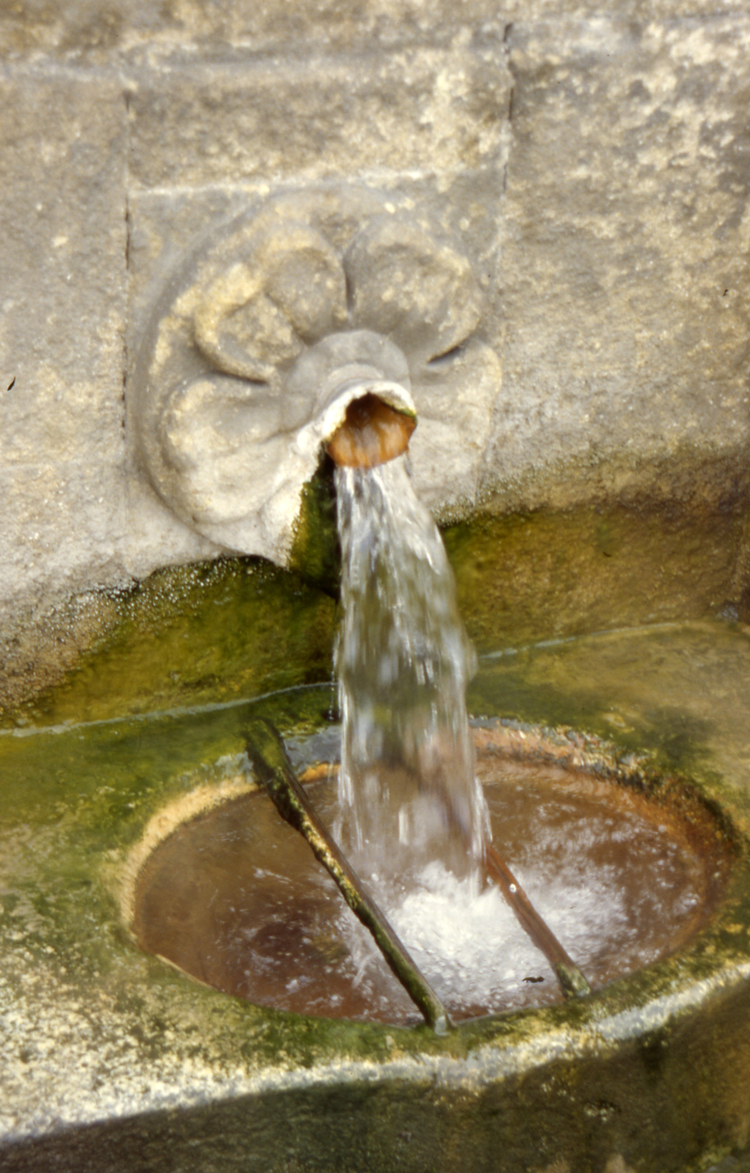 Ourense Ansicht 3